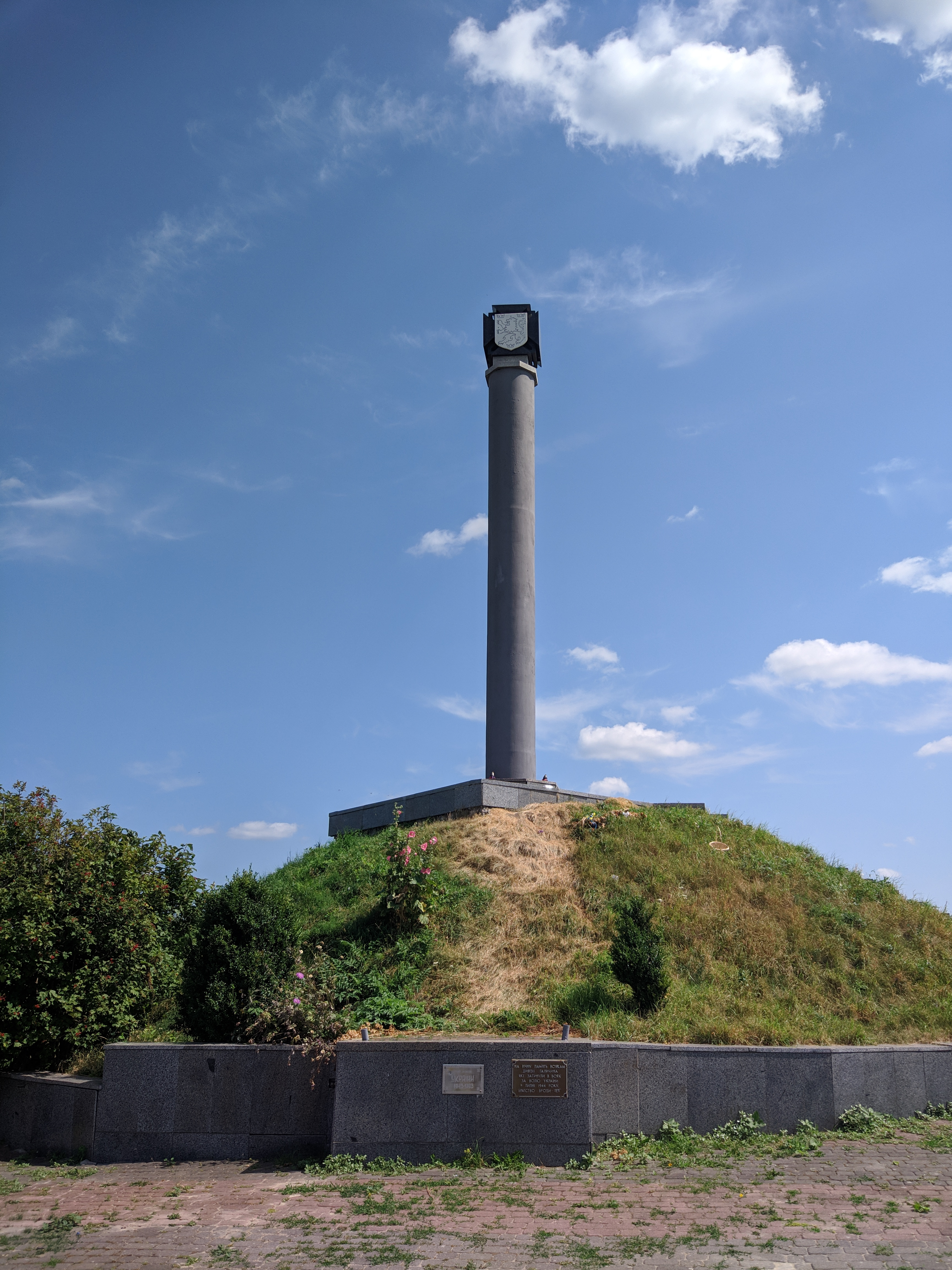 На могилі вояків Першої української дивізії "Галичина" УНА на горі Жбир с. Ясенів